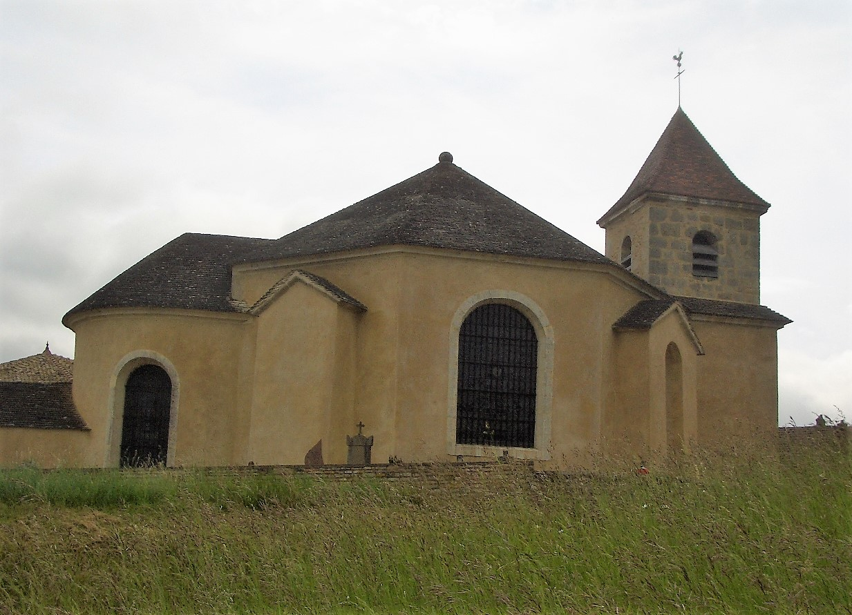 église saint antoine